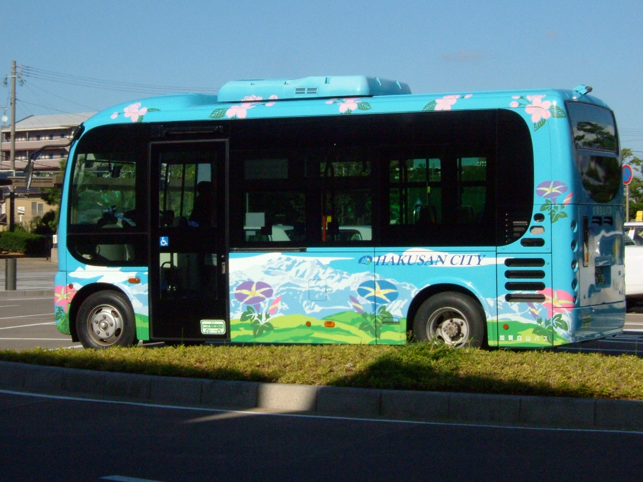 めぐーる側面